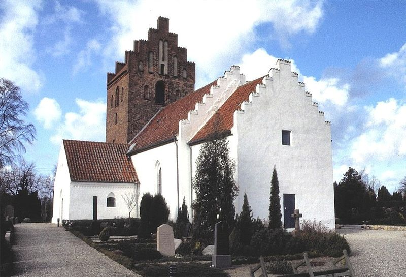 Gundsømagle Kirke i Danmark. Gundsømagle kirke